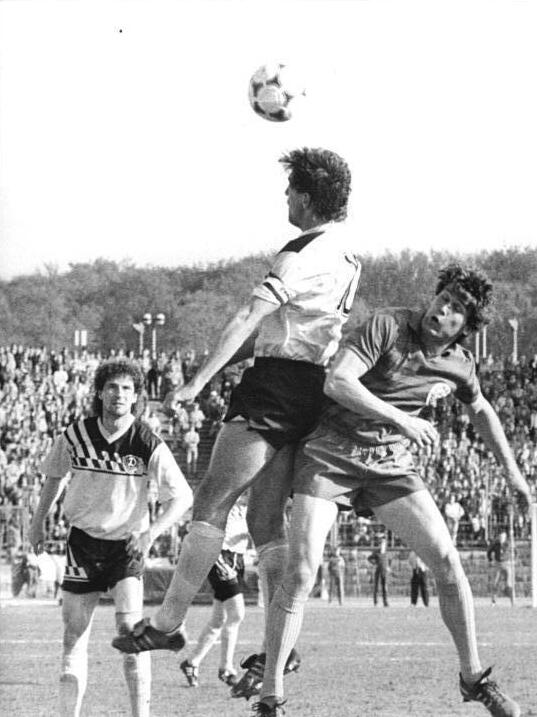 ADN-ZB-Sindermann- -10-5-89-ba-Rostock: Fußball-Oberliga- 23. Spieltag- FC Hansa Rostock - SG Dynamo Dresden 2:2- Die Punkteteilung im ausverkauften Ostsee-Stadion sicherte den Elbstädtern drei Spieltage vor dem Saison-Ausklang nach elf Jahren wieder den Meistertitel. Ralf Minge liefert sich hier ein Kopfballduell mit Jens Wahl (r); links der Dresdner Verteidiger Andreas Trautmann.